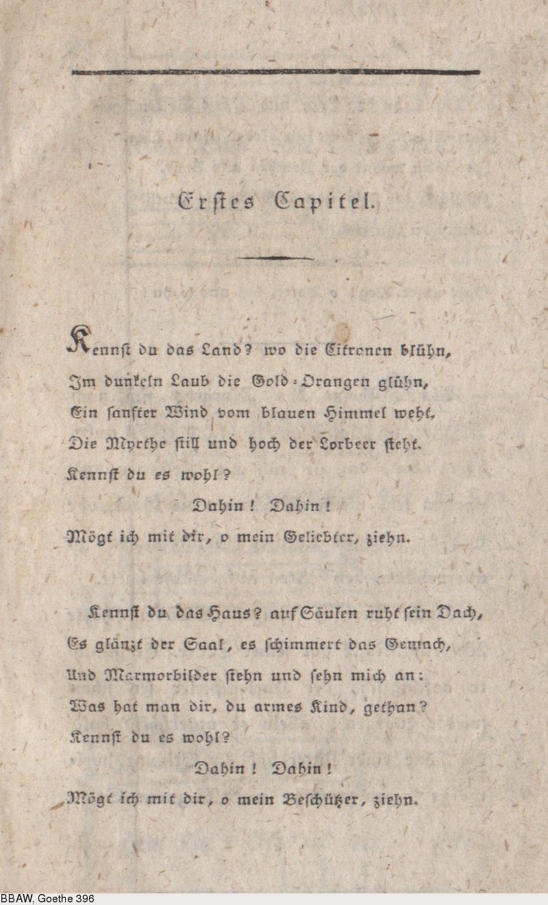 Kennst du das Land? wo die Citronen blühn. In: Wilhelm Meisters Lehrjahre. Bd. 2. Berlin, 1795. Frankfurt und Leipzig, 1795. S. 7-8